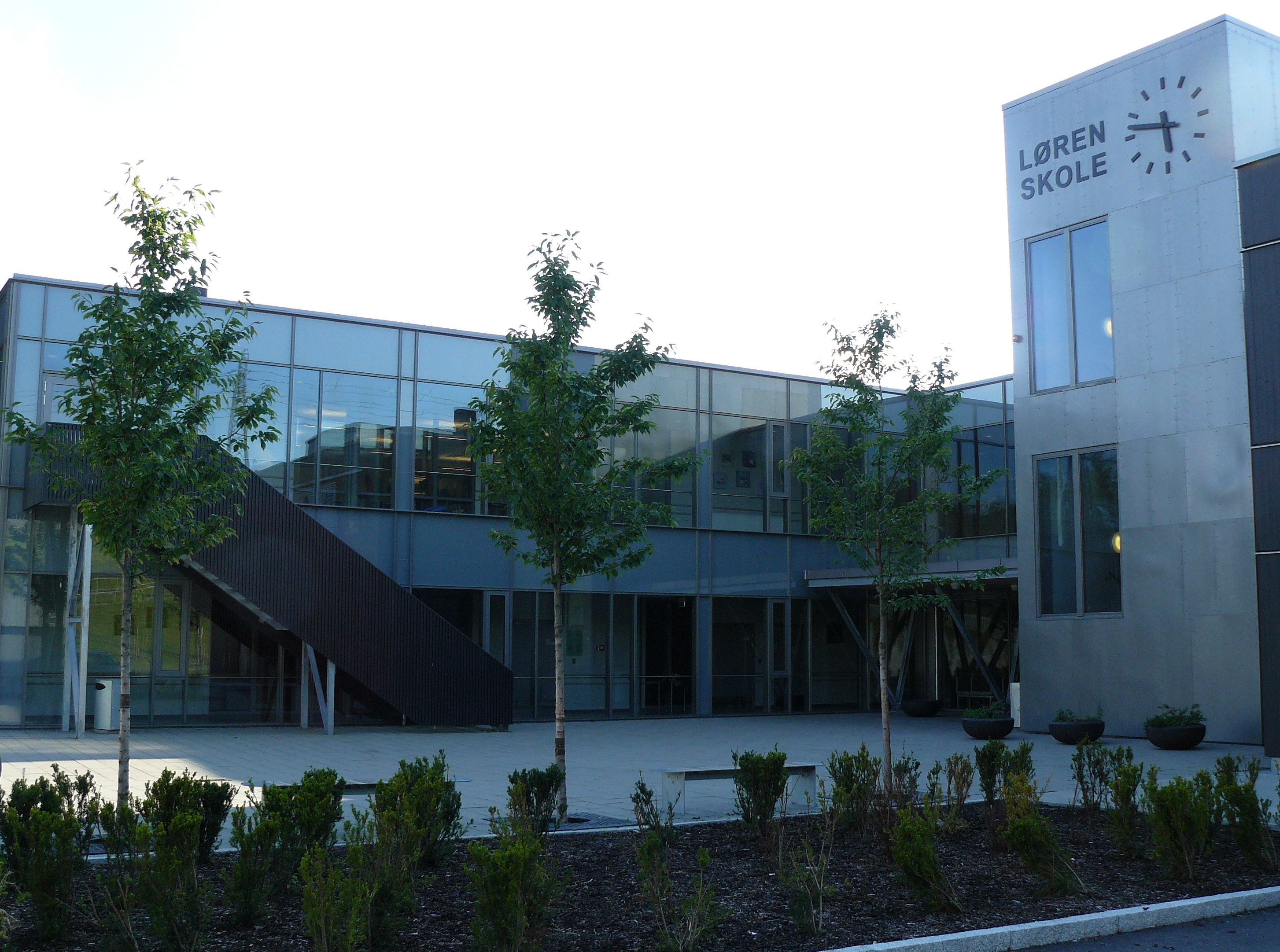 Løren school, Oslo